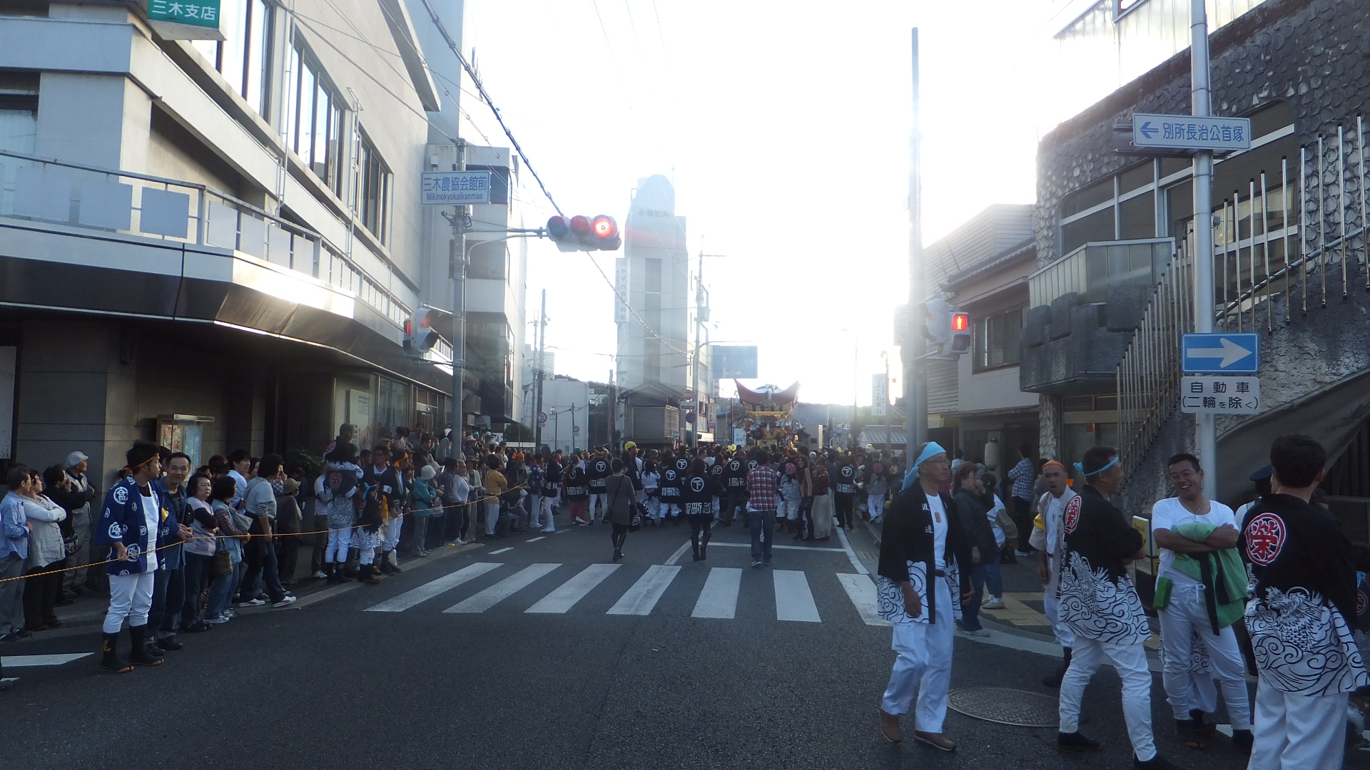 大宮八幡宮例大祭で迂回している車